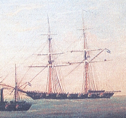 Escuadra del Estado de Buenos Aires en 1859 (detalle)